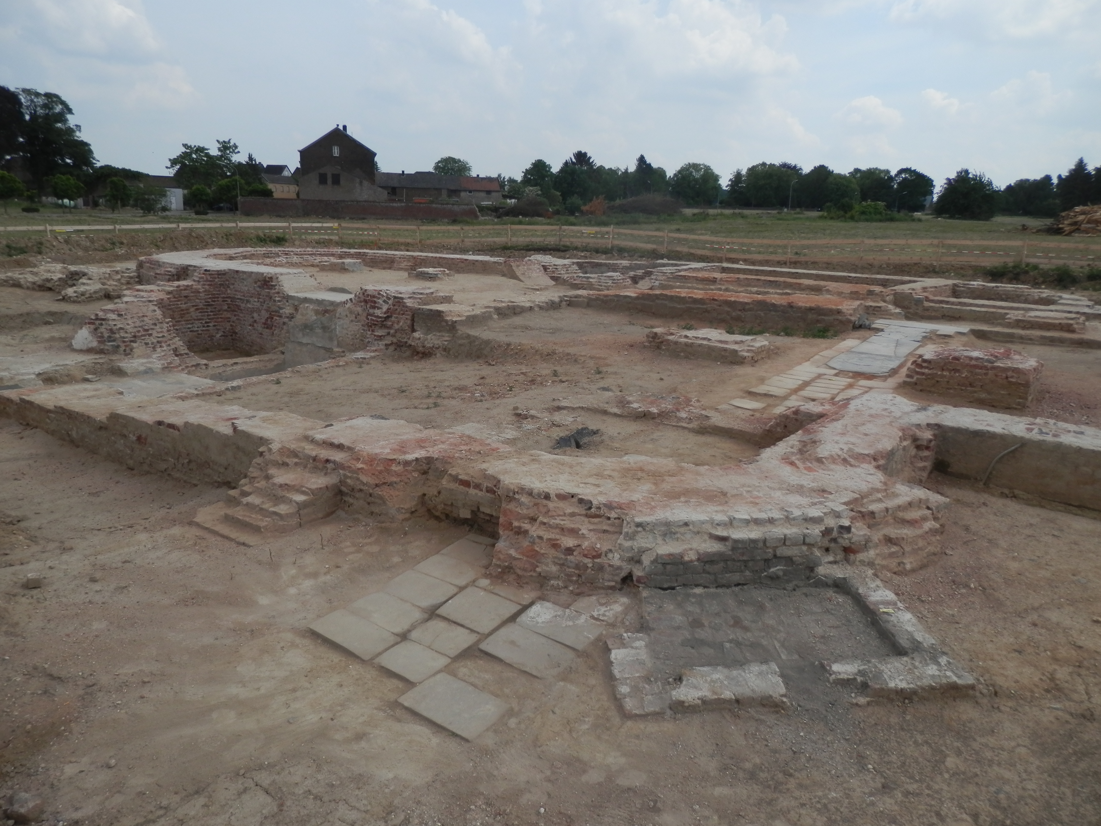 Ausgrabungen am früheren Standort der abgerissenen Kirche St.Lambertus in Erkelenz-Immerath